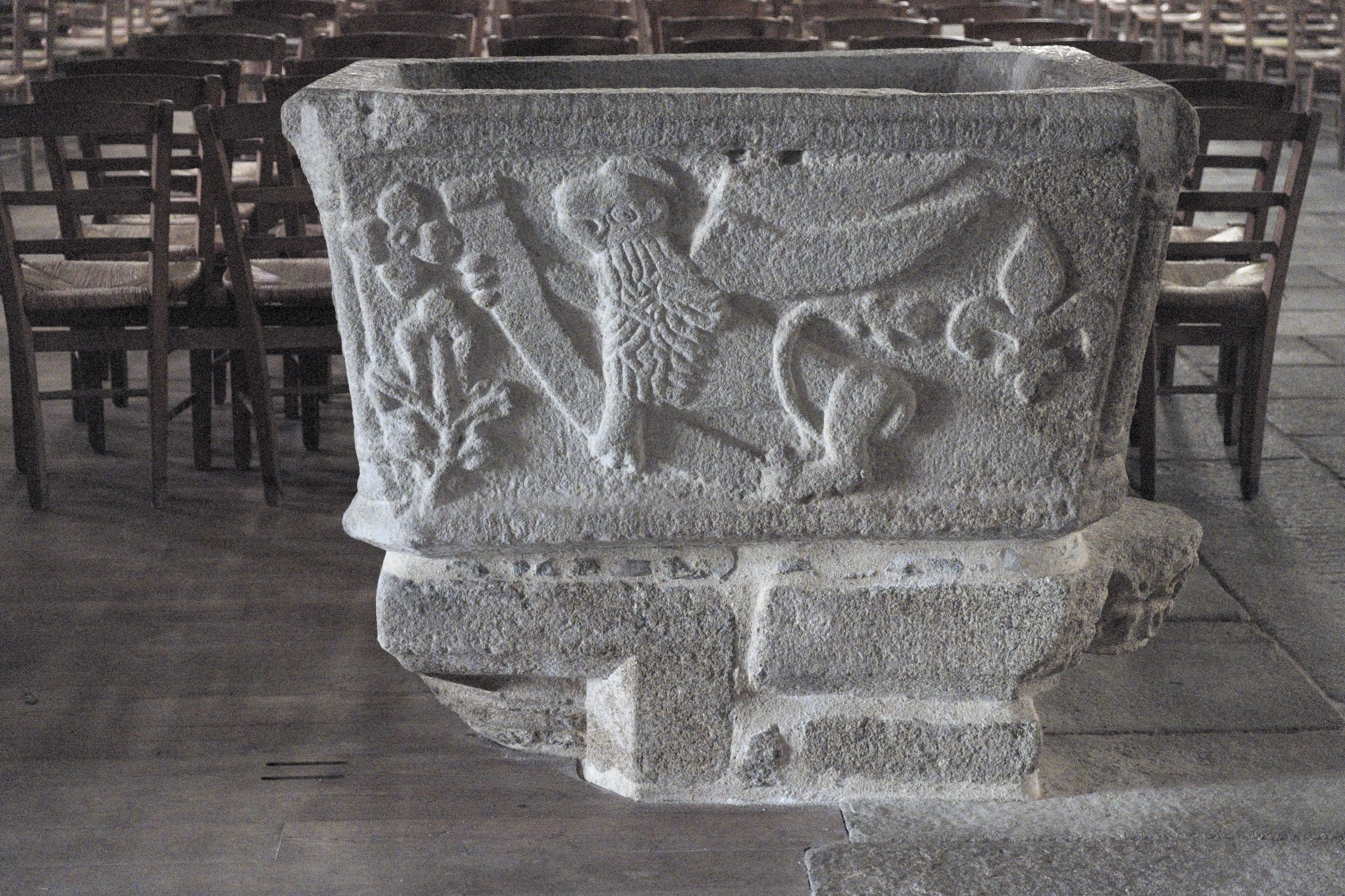 Katholische Pfarrkirche Saint-Pierre-Saint-Paul in Bazouges-la-Pérouse im Département Ille-et-Vilaine (Region Bretagne/Frankreich), Taufbecken aus dem 15. Jahrhundert, an den Seiten Reliefs der Evangelistensymbole